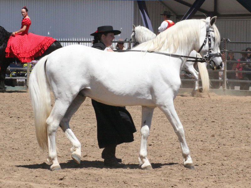 Andalusian